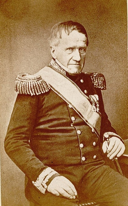 Fotografi av Paul Hansen Birch ca.1860. Ukjent fotograf